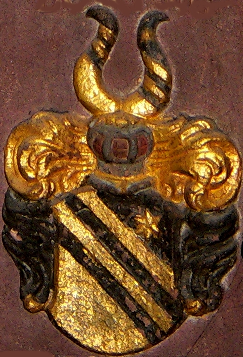 Wappen der Vorfahren von Christoffel Eitel von Schutzbar und Frau auf ihrem Epitaph in der ev. Kirche in Treis an der Lumbda (Hessen, Deutschland). Männliche Linie: 01m - 16m; weibliche Linie: 01w - 16w.